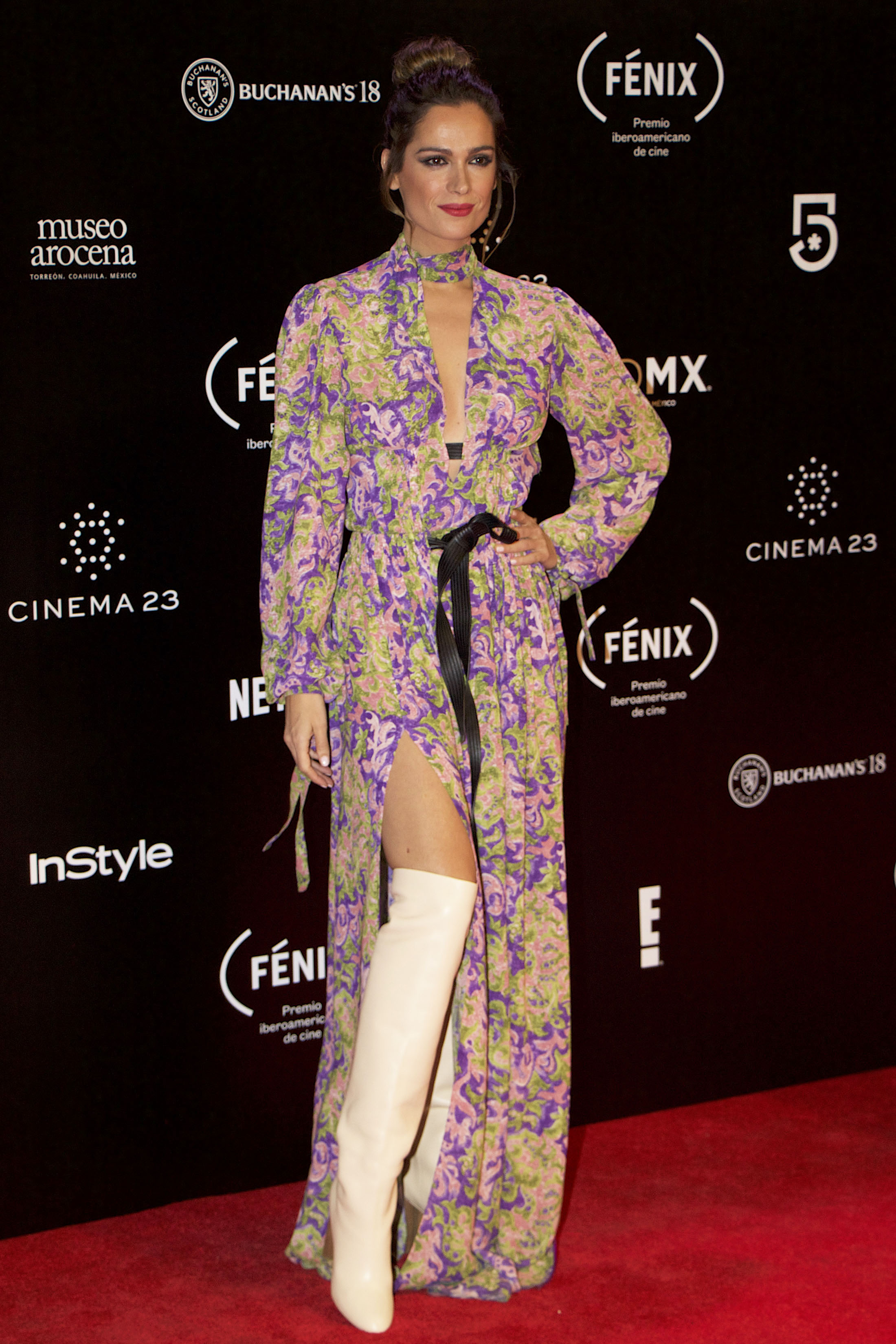 Previo a la entrega de los Premios Fénix 2018, actores, actrices, elencos de las películas y series nominadas, pasaron por la alfombra roja, en la parte exterior del Teatro de la Ciudad Esperanza Iris.